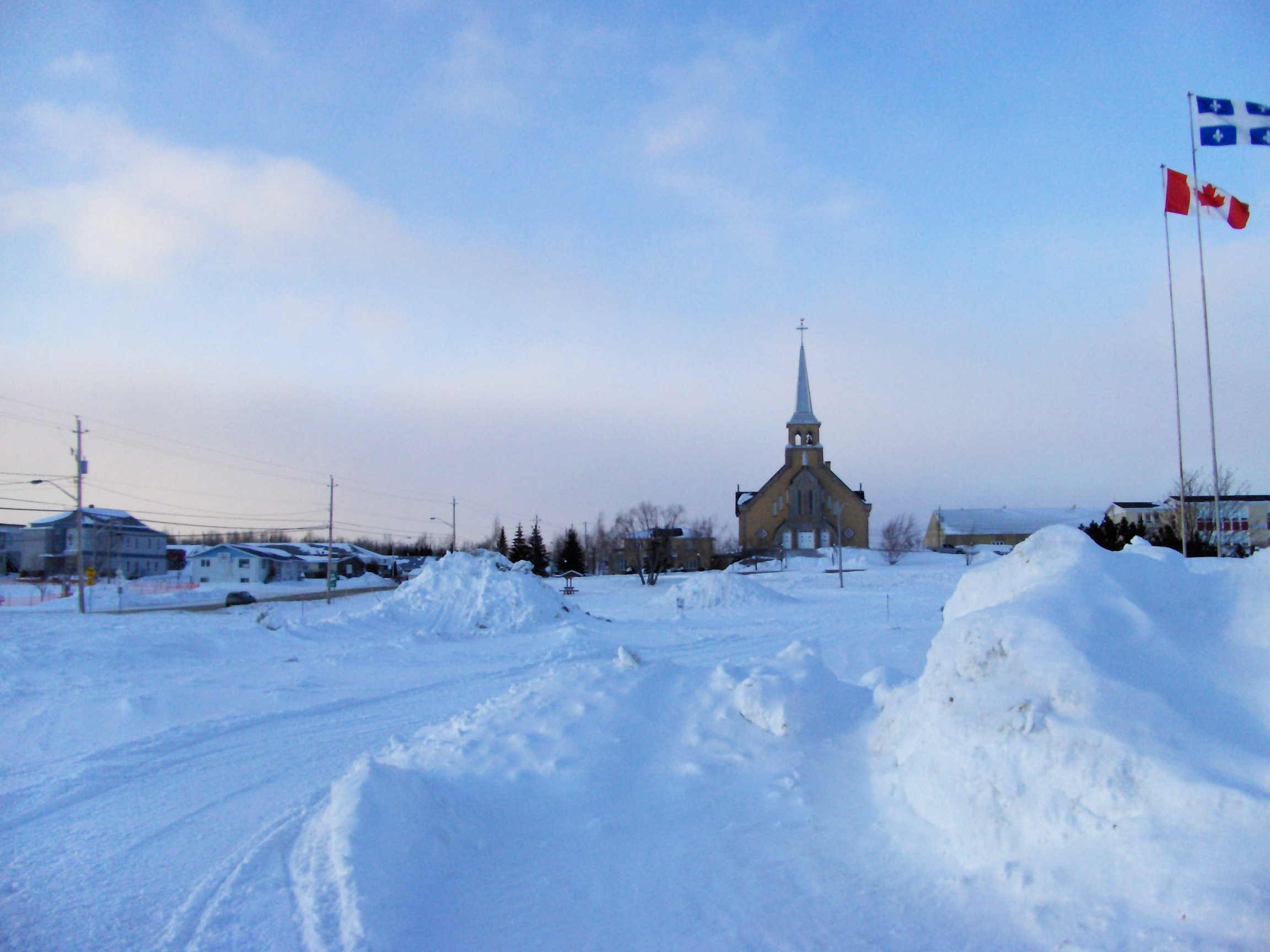 Village de Dupuy (abitibi ouest)